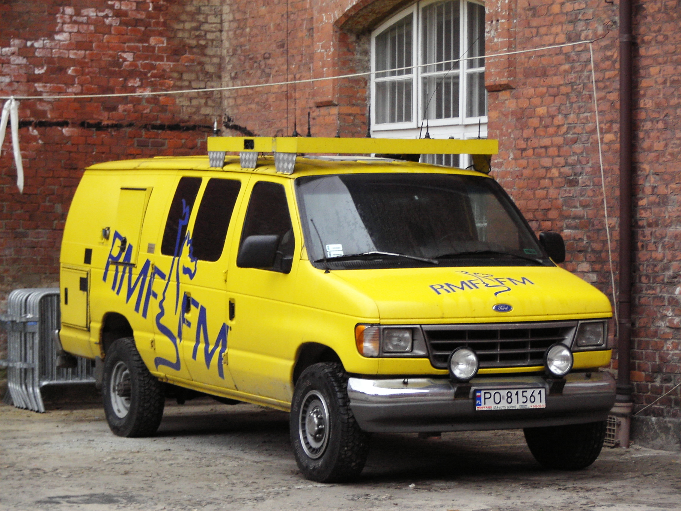 Historyczny woz RMF-u. Amerykanski Ford E.